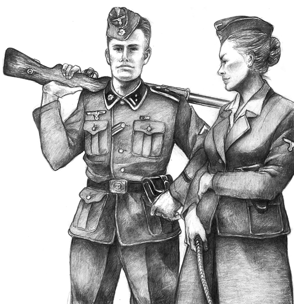 SS-Aufseherin: Female Camp Guards